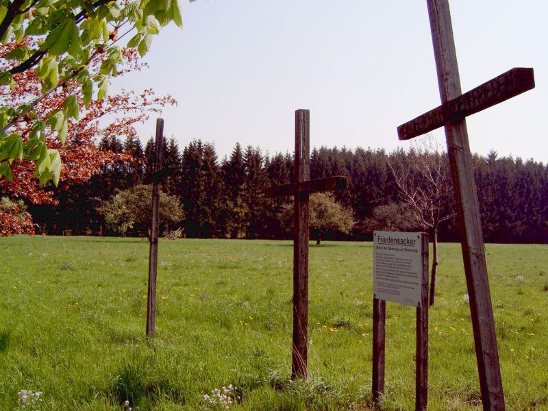 Beschreibung: Drei mahnende Holzkreuze auf dem Friedensacker bei Bell, als Rest der ehemals 96 dort aufgestellten Kreuze (eines für jede Rakete), westlich des Geländes der ehemaligen Raketenbasis Pydna Quelle: eigene Fotografie Fotograf:Achim Berg 07:53, 26 June 2006 (UTC) Datum: 9.5.2006